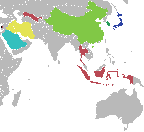 Mapa de la competición